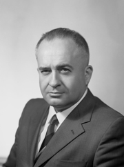 Giorgio Pisanò, senatore